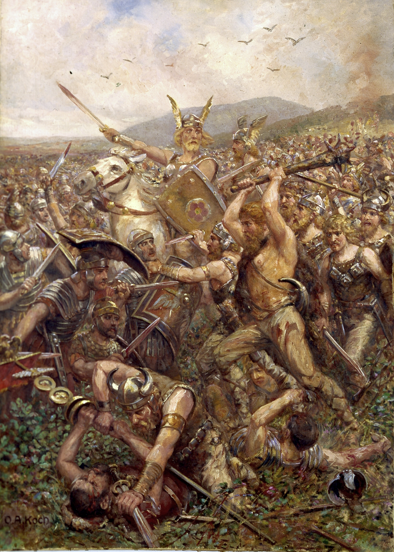 Otto Albert Koch: Varusschlacht, 1909 (Lippisches Landesmuseum Detmold)